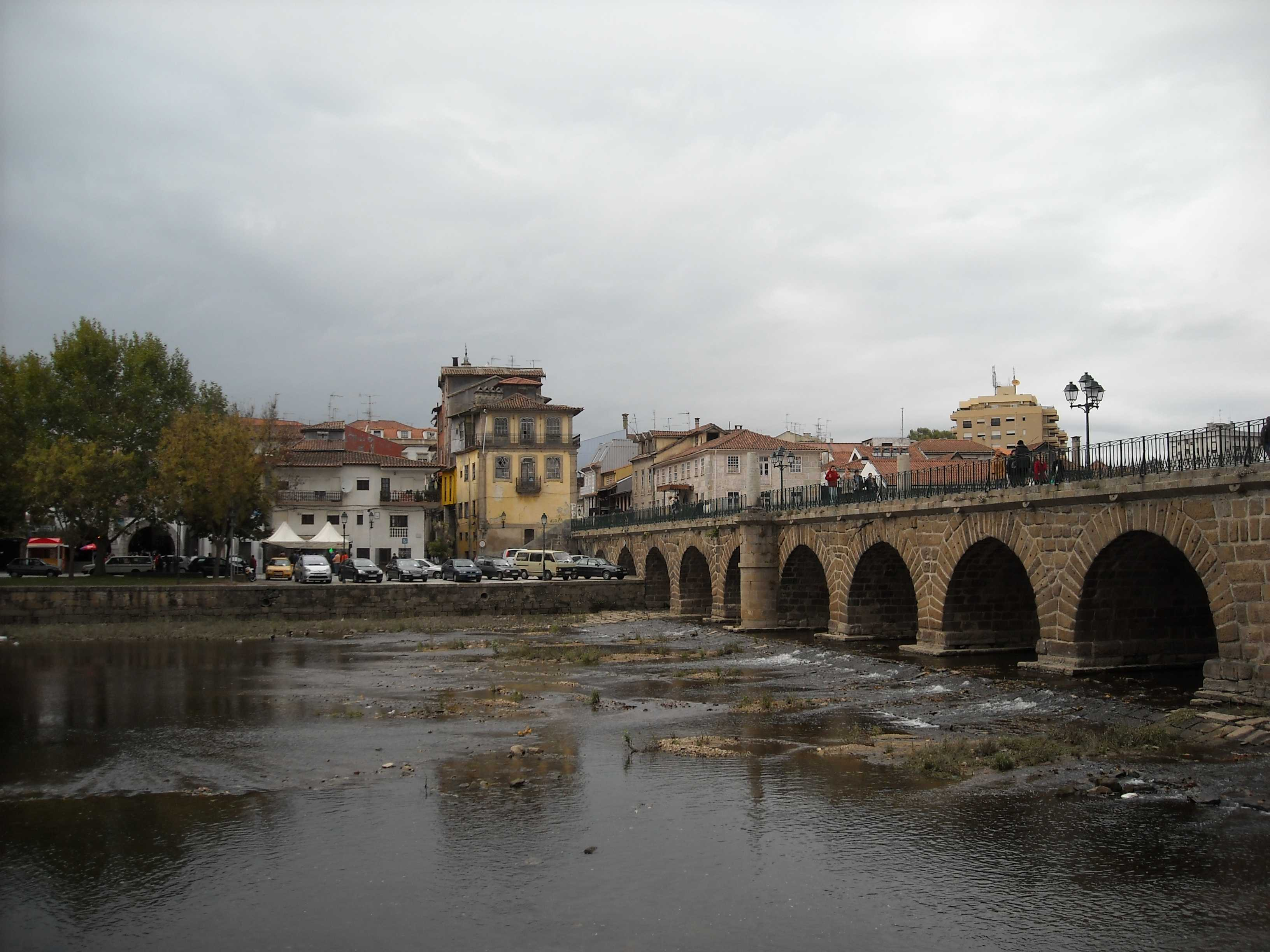 Chaves, Portugal, noviembre 2008 Chaves, Portugal, noviembre 2008